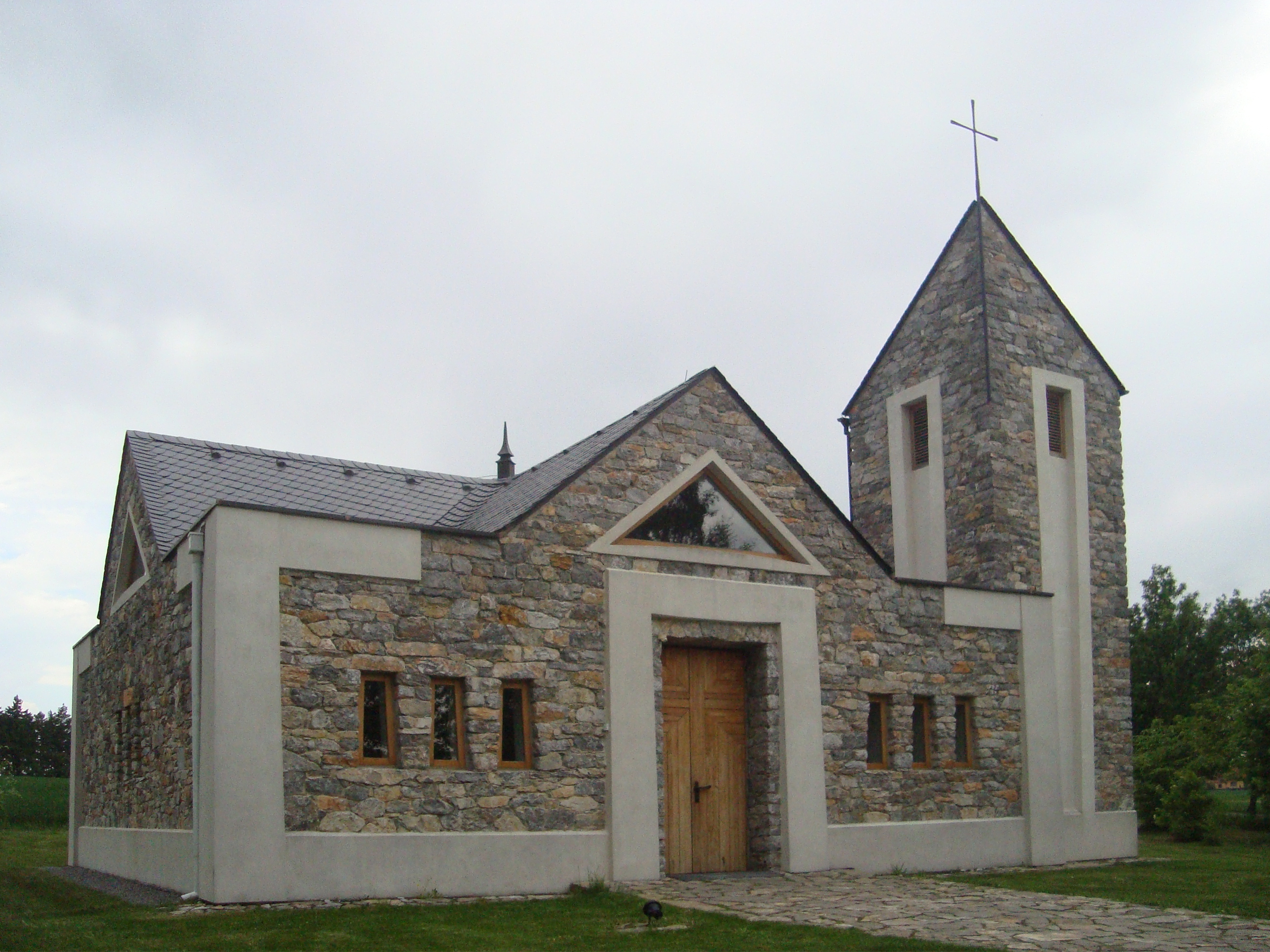 Kaple svaté Barbory v Rudici